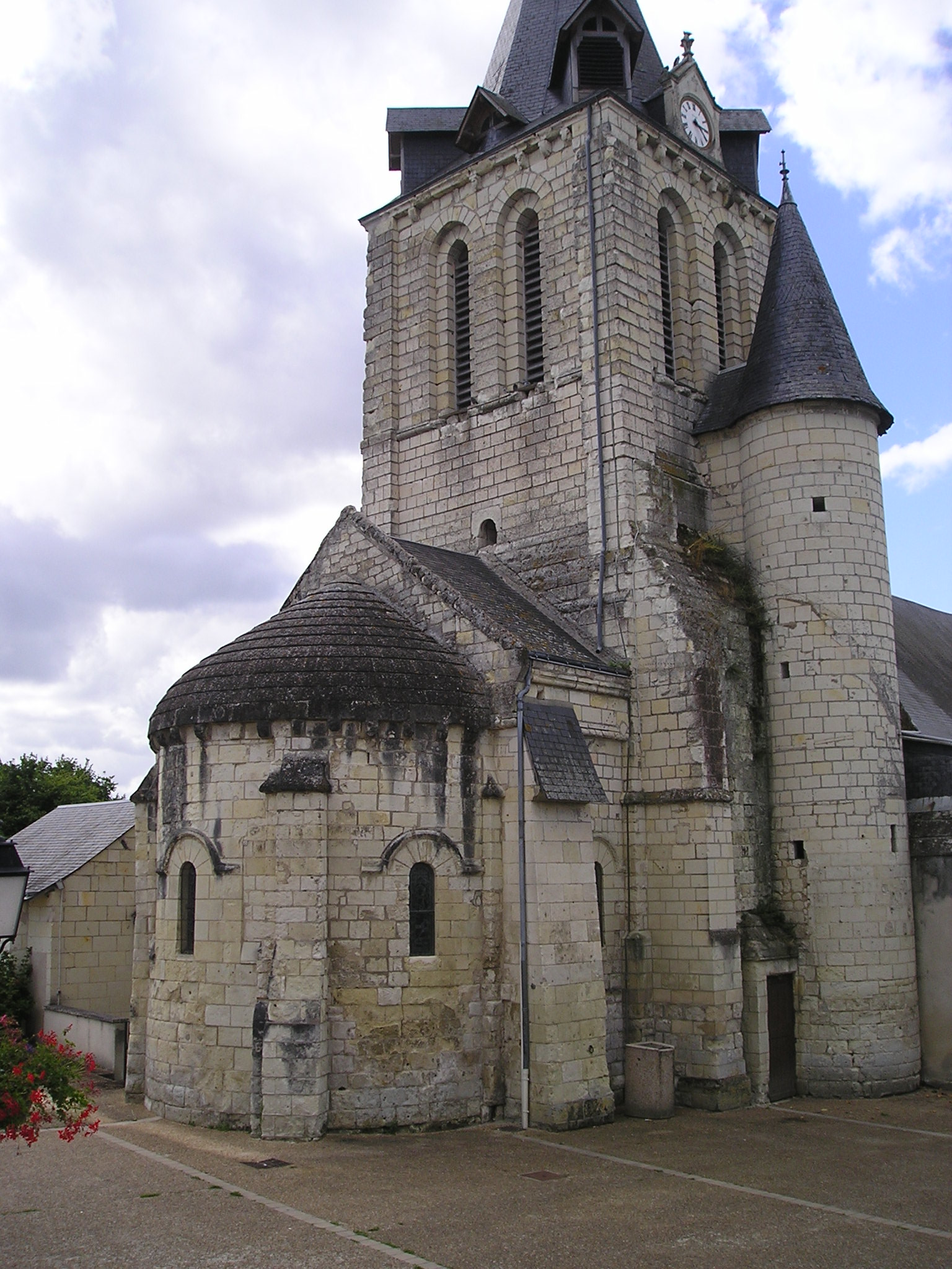 Huimes,_Kirche_Saint-Maurice